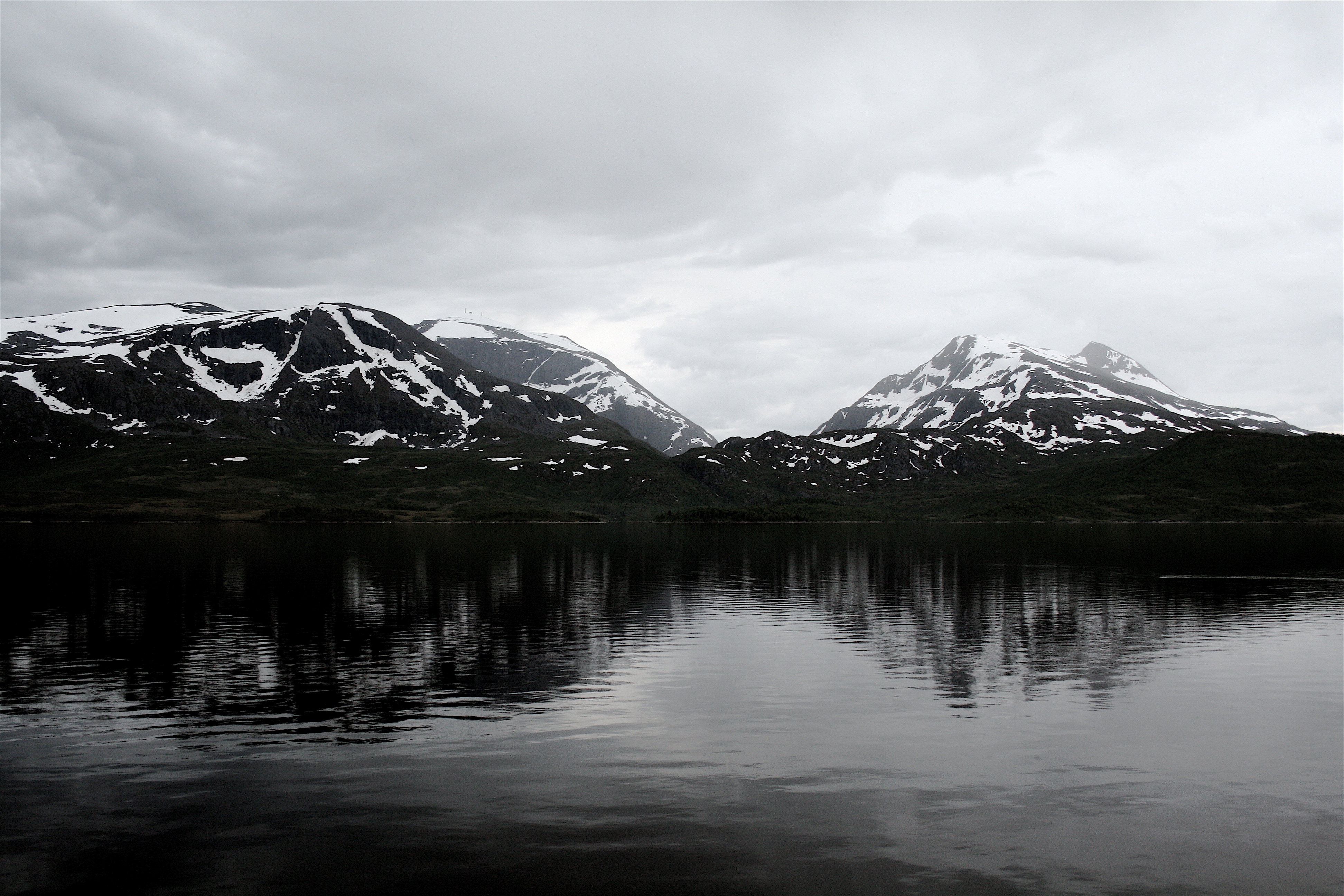 Storvatnet in Harstad